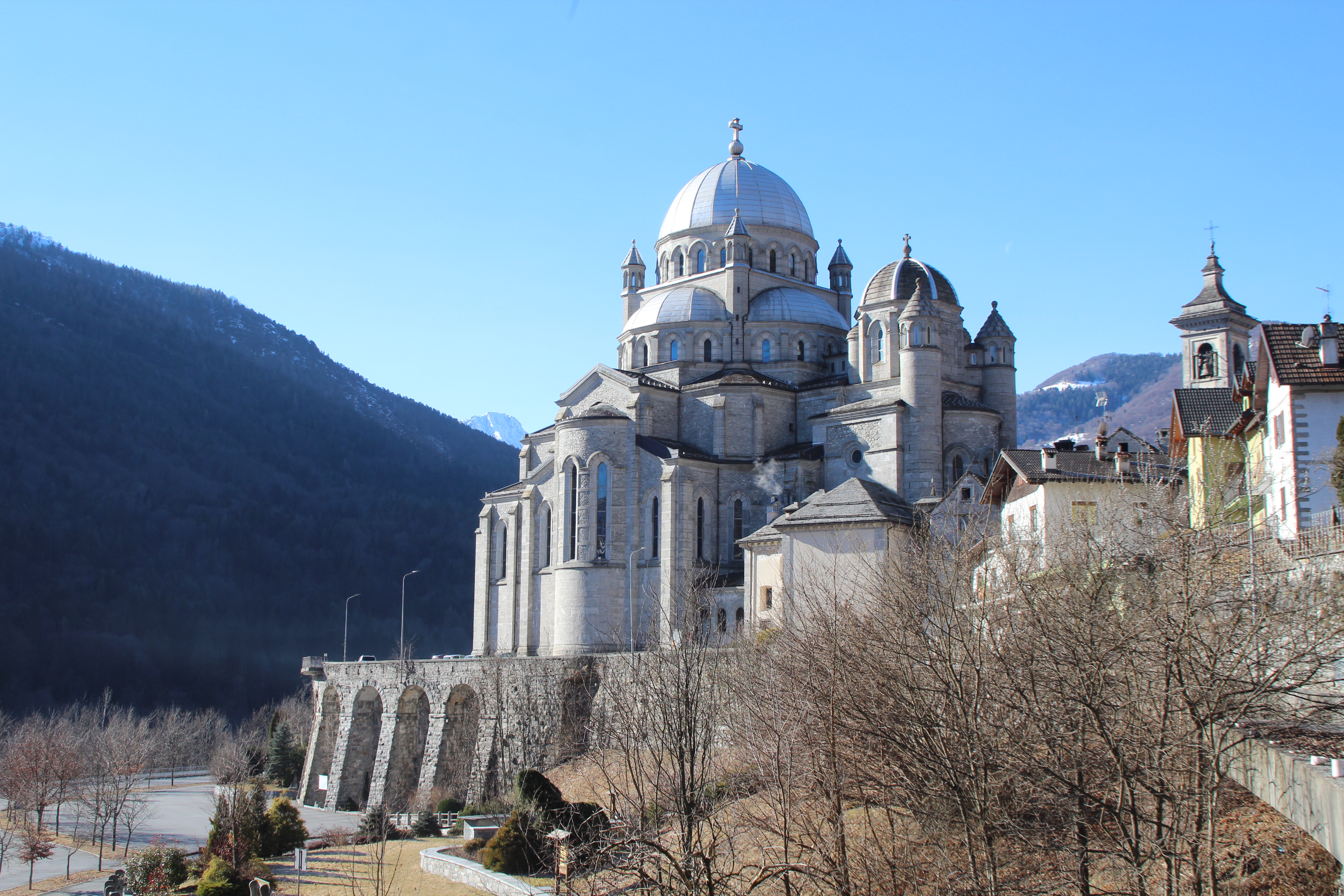 Madonna del Sangue in Re, Valle Vigezzo (Italien)